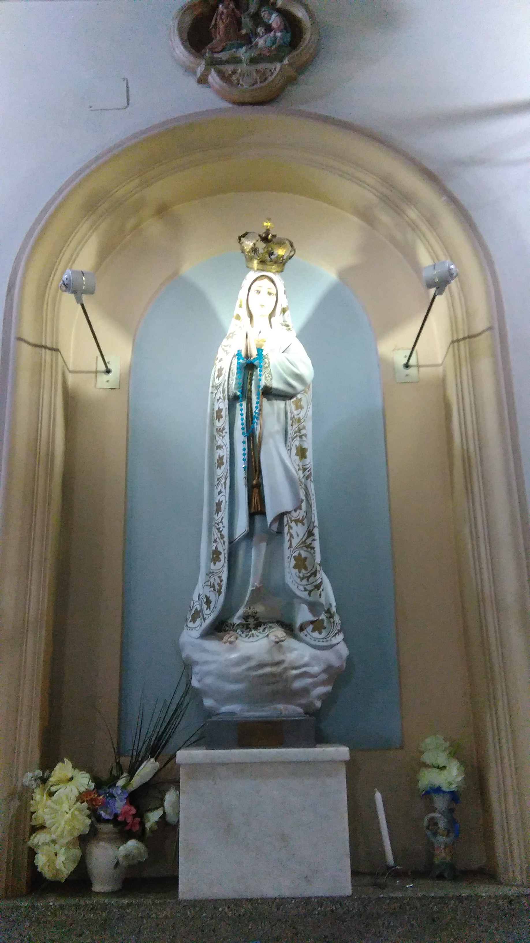 Imagen de Nuestra Señora de Fatima, Parroquia Inmaculado Corazón de Maria Bahia Blanca